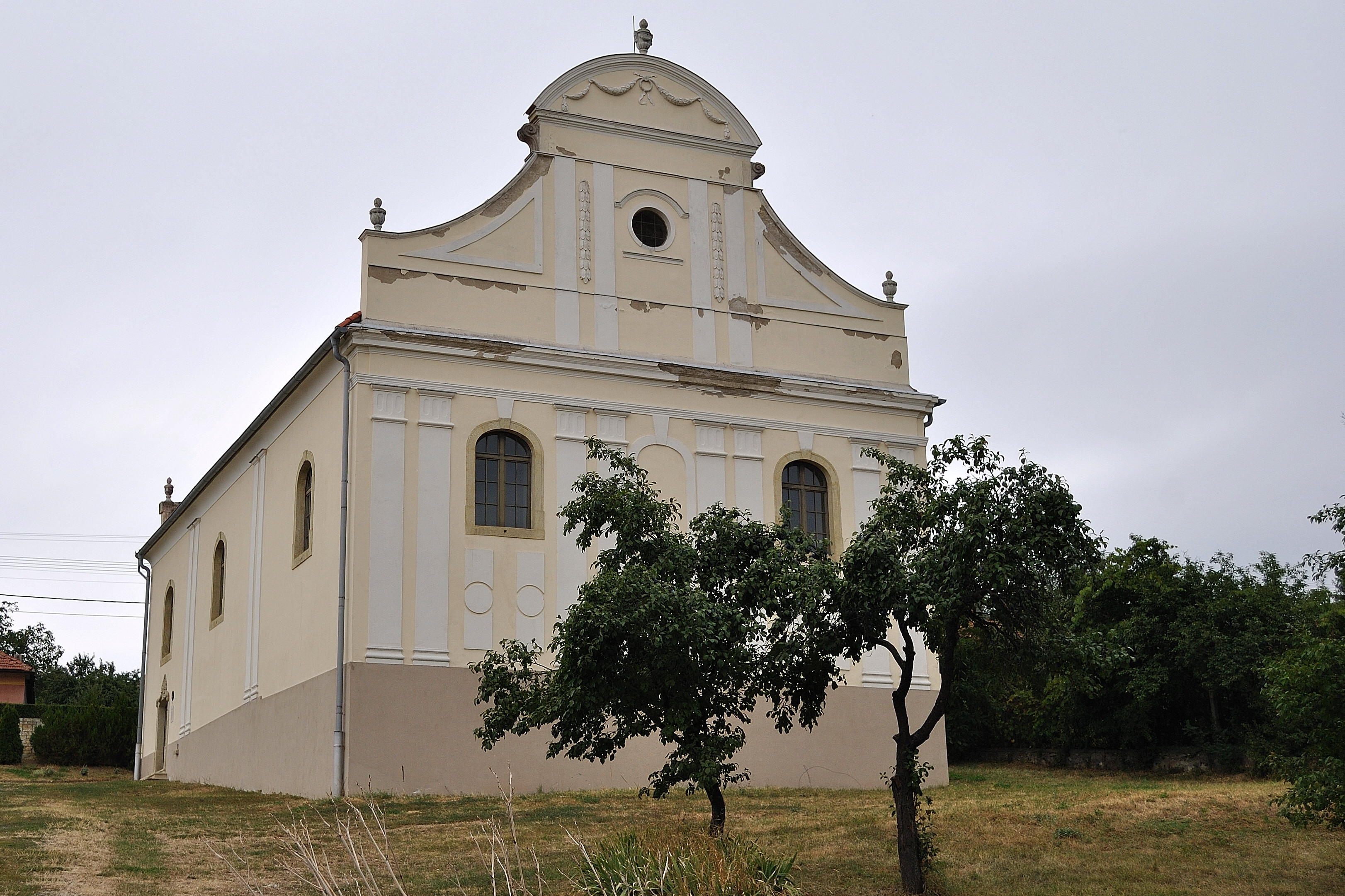 zsinagóga, Mád This is a photo of a monument in Hungary. Identifier: 2883